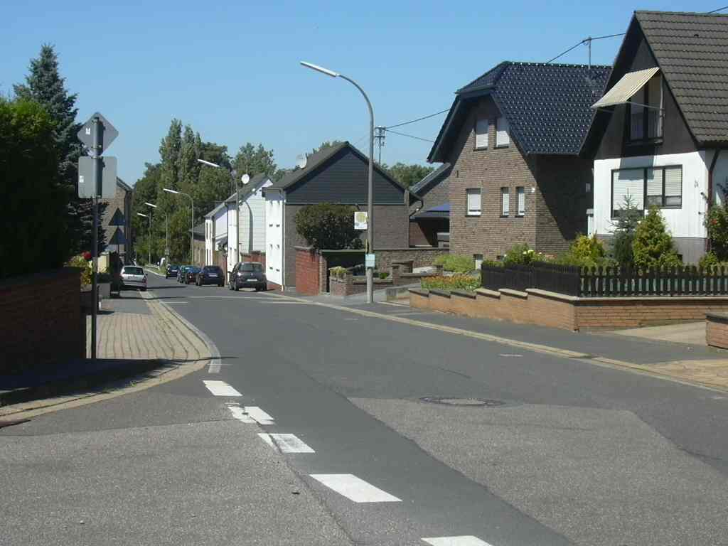 Linzenich